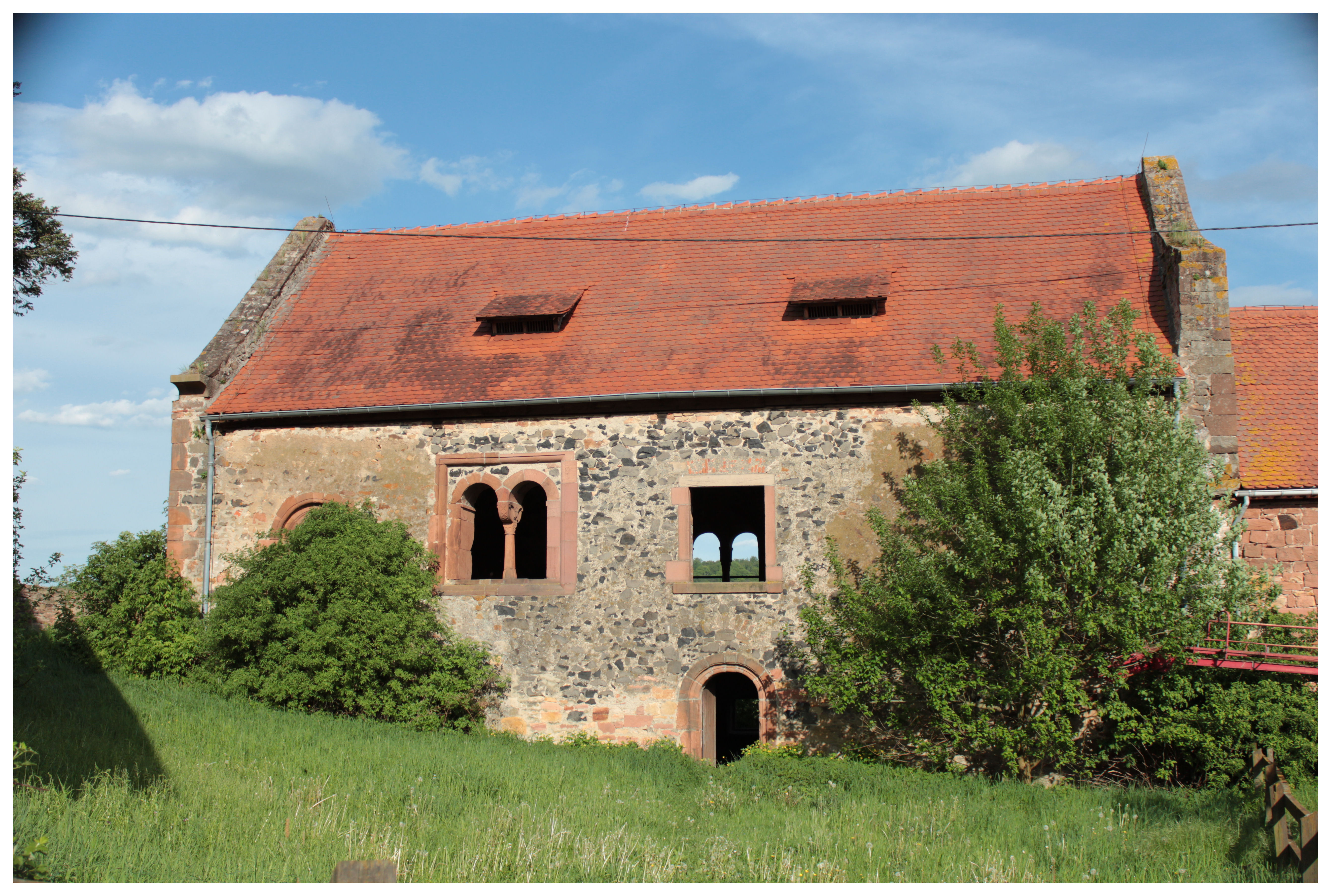 Kloster Konradsdorf Nebengebäude